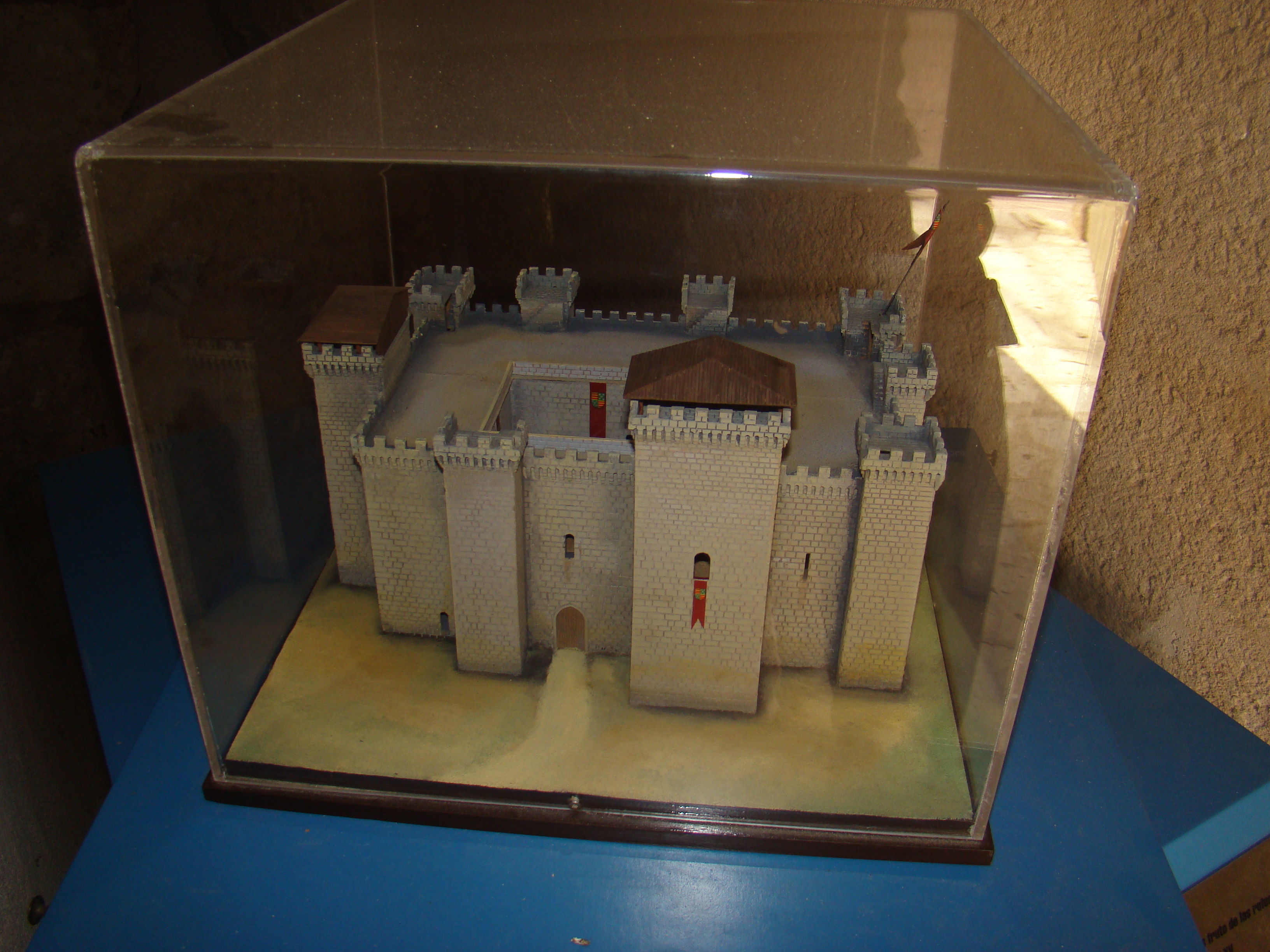 Maqueta del castillo de Villalba de los Alcores en la provincia de Valladolid, España.